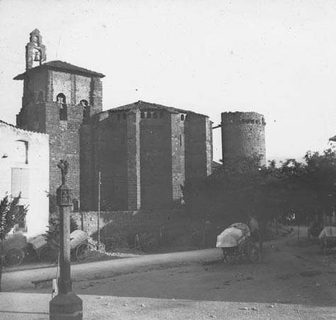 Posterior de l'església de Santa Maria i creu de terme de Tremp amb un carro. Frederic Bordas i Altarriba (ca. 1890)